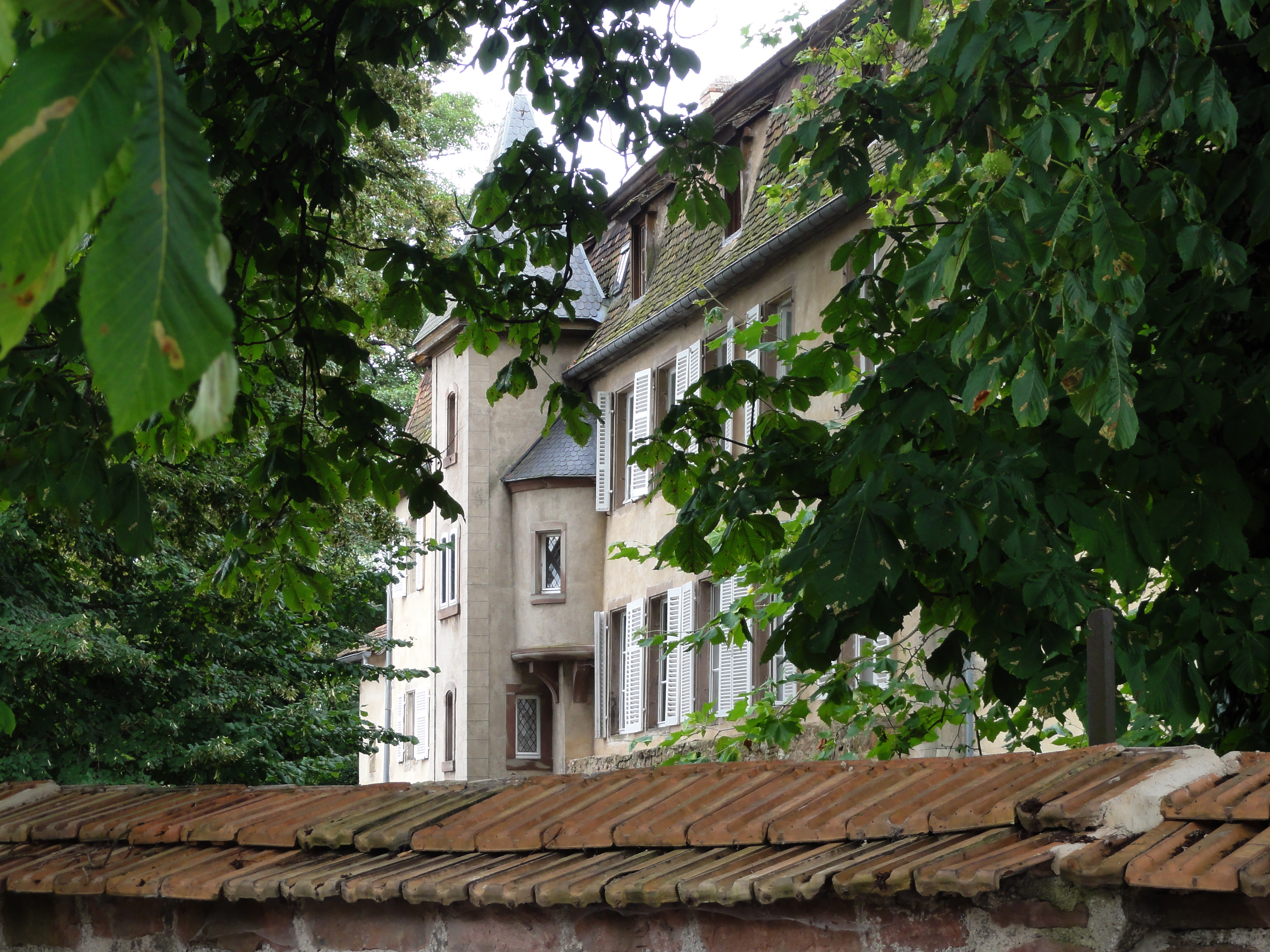 Alsace, Bas-Rhin, Stotzheim, Château de Grünstein (XIIIe-XVe-XIXe), 21 rue du Bas-Village. It is indexed in the Base Mérimée, a database of architectural heritage maintained by the French Ministry of Culture, under the references PA00085011 and IA67011082 .